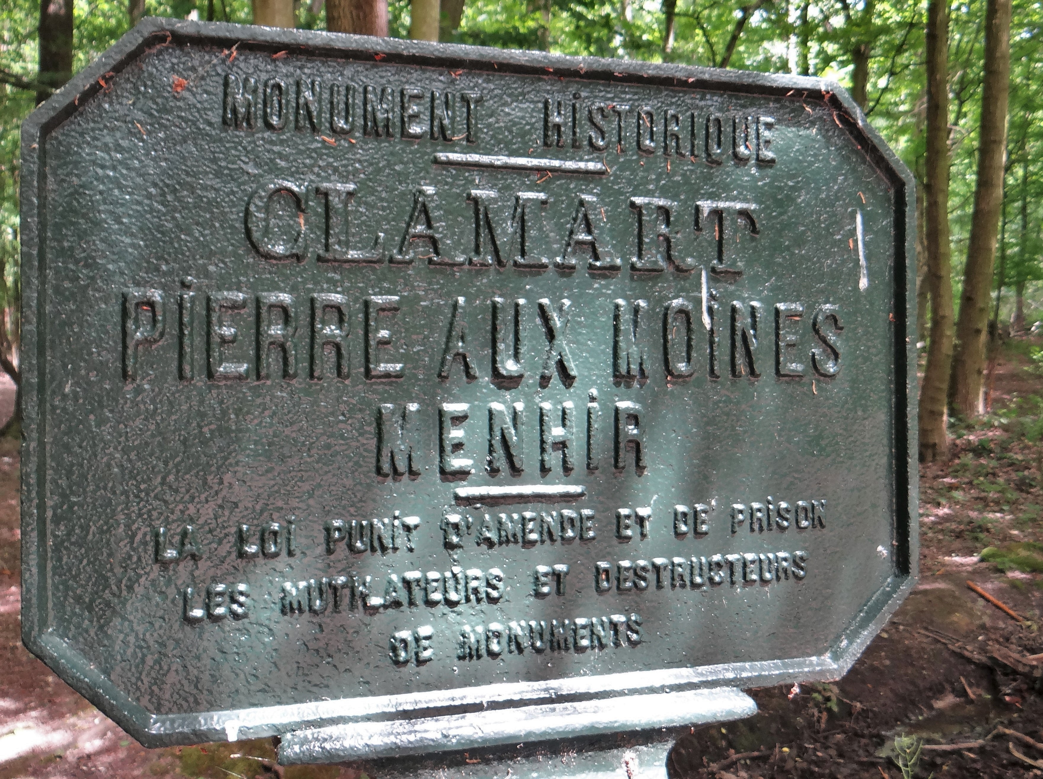 Pancarte près du Menhir de la Pierre aux Moines, Clamart, France, mai 2020